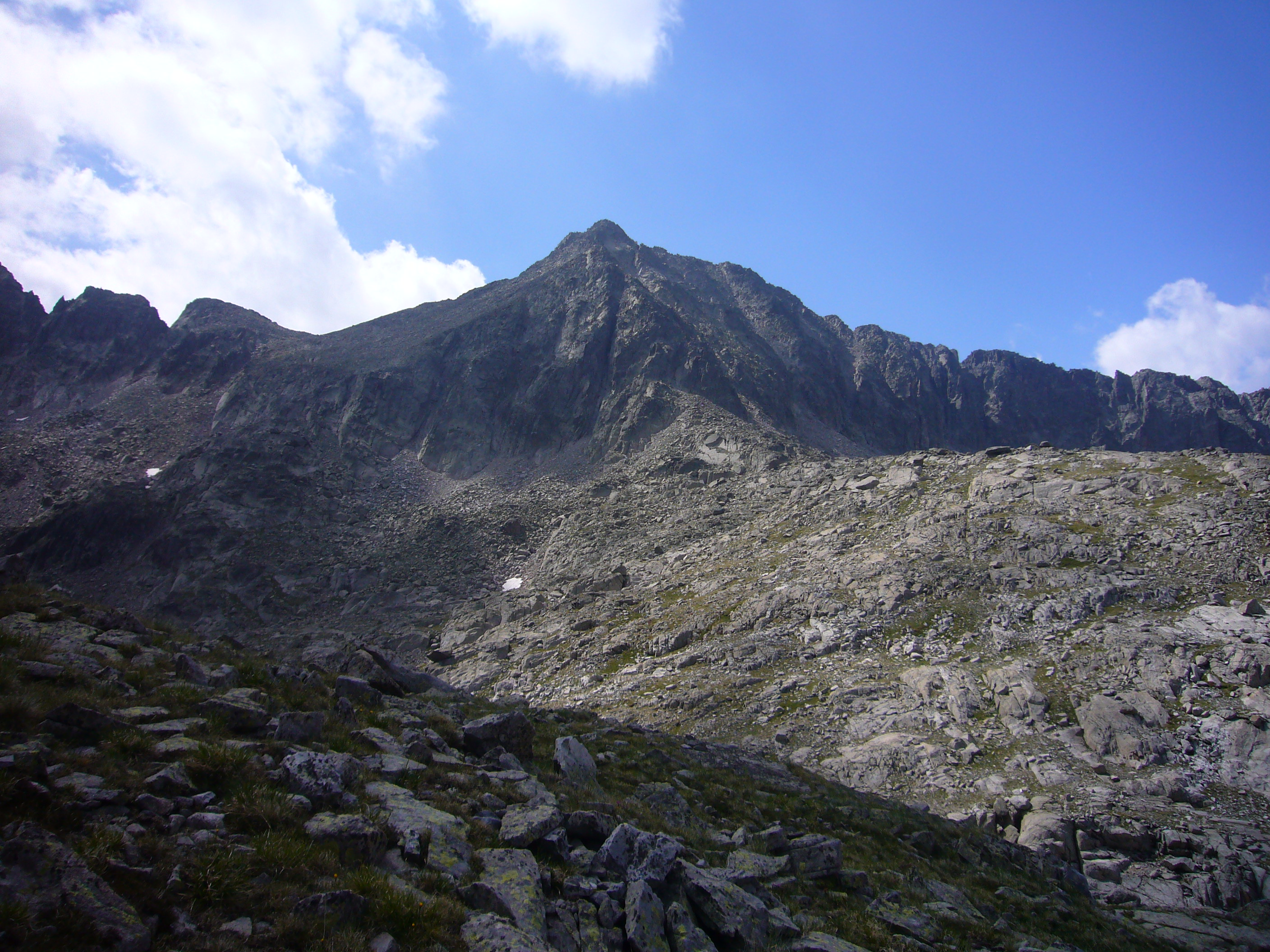 Pic de la Pala Gespadera (al centre) i Boyn d’Aigüissi (a la seva dreta), vistos des de la Vall de Comalesbienes; la Vall de Boí, Alta Ribagorça, Catalunya